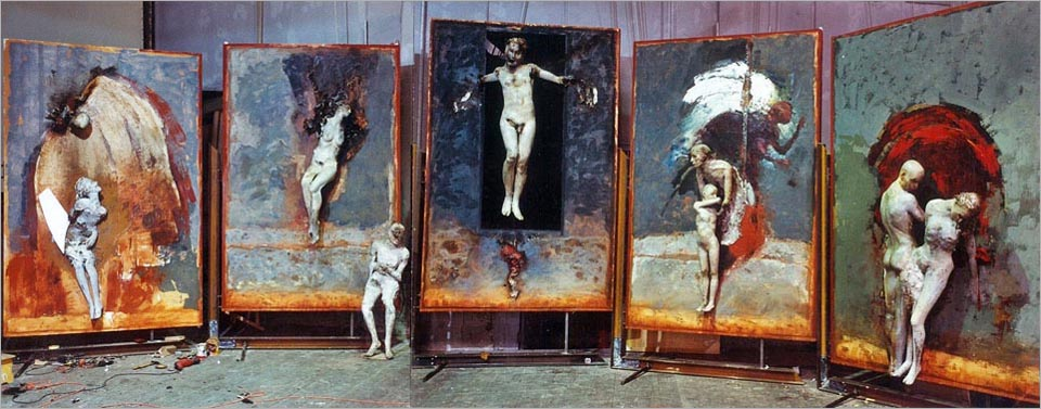 Polittico di sculture in vetro resina policrome montate su pannelli di legno ed appoggiate su putrelle di ferro, 2003 Dimensione totale dell’installazione 4 x14 m Ogni pannello misura 300 x 200 x 50 cm